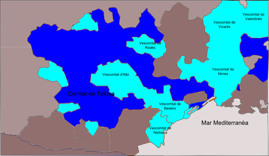 Territòris dau còmte de Tolosa : - blau sorn : possessions dirèctas. - blau clar : possessions indirèctas.